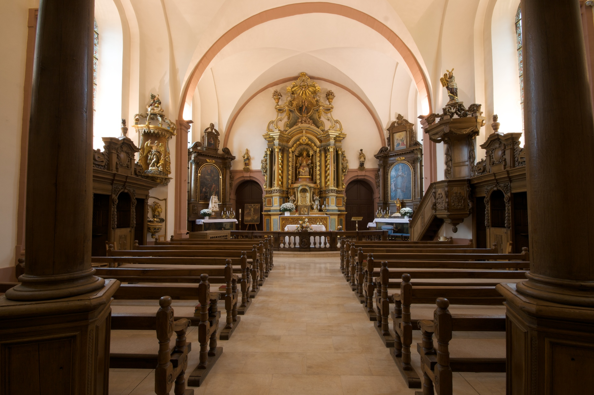 L'intérieur de l'église d'Eppeldorf (Luxembourg)